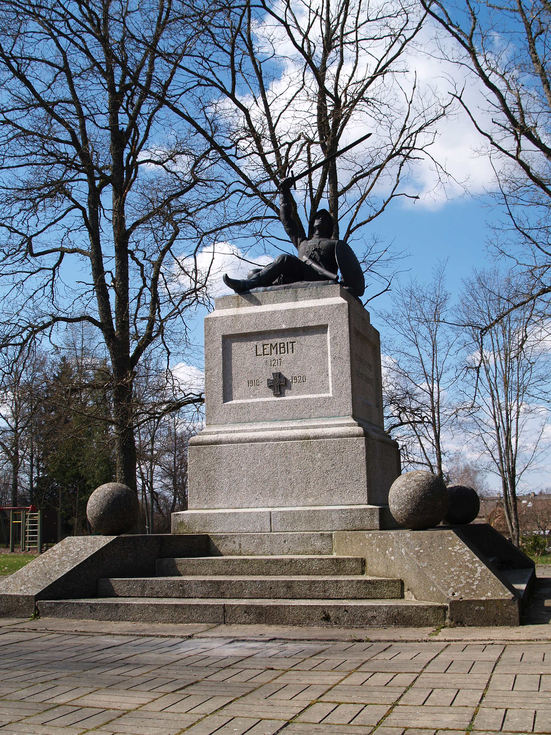 Suure-Jaani Vabadussõja mälestussammas